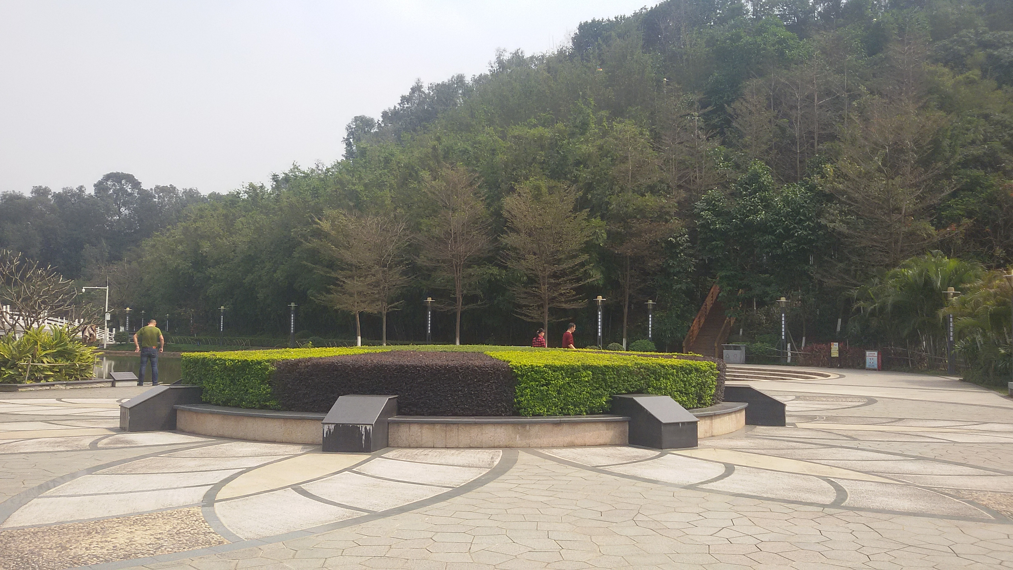 粵語: 疊翠園北門